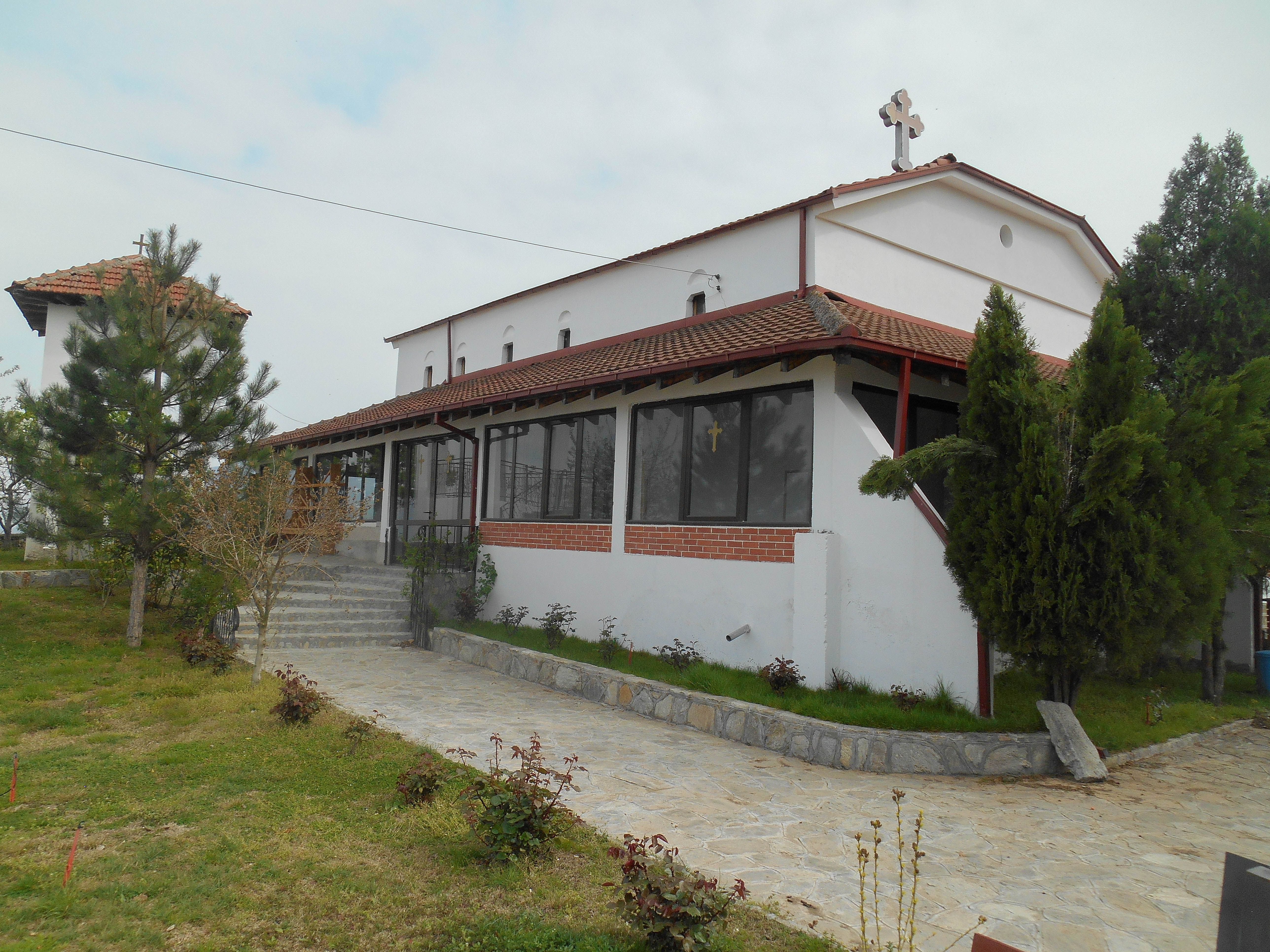 Црква „Св. Атанасиј“ - Куклиш